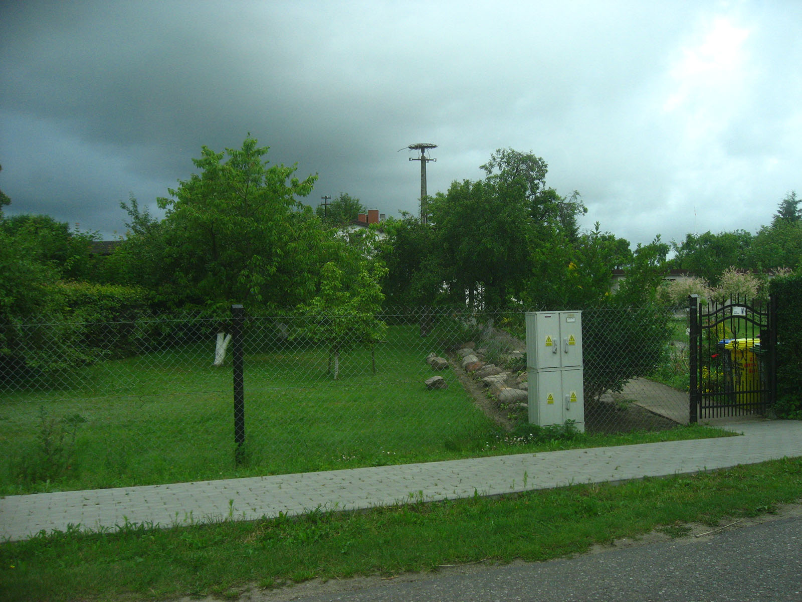 Bogucino - bocianie gniazdo